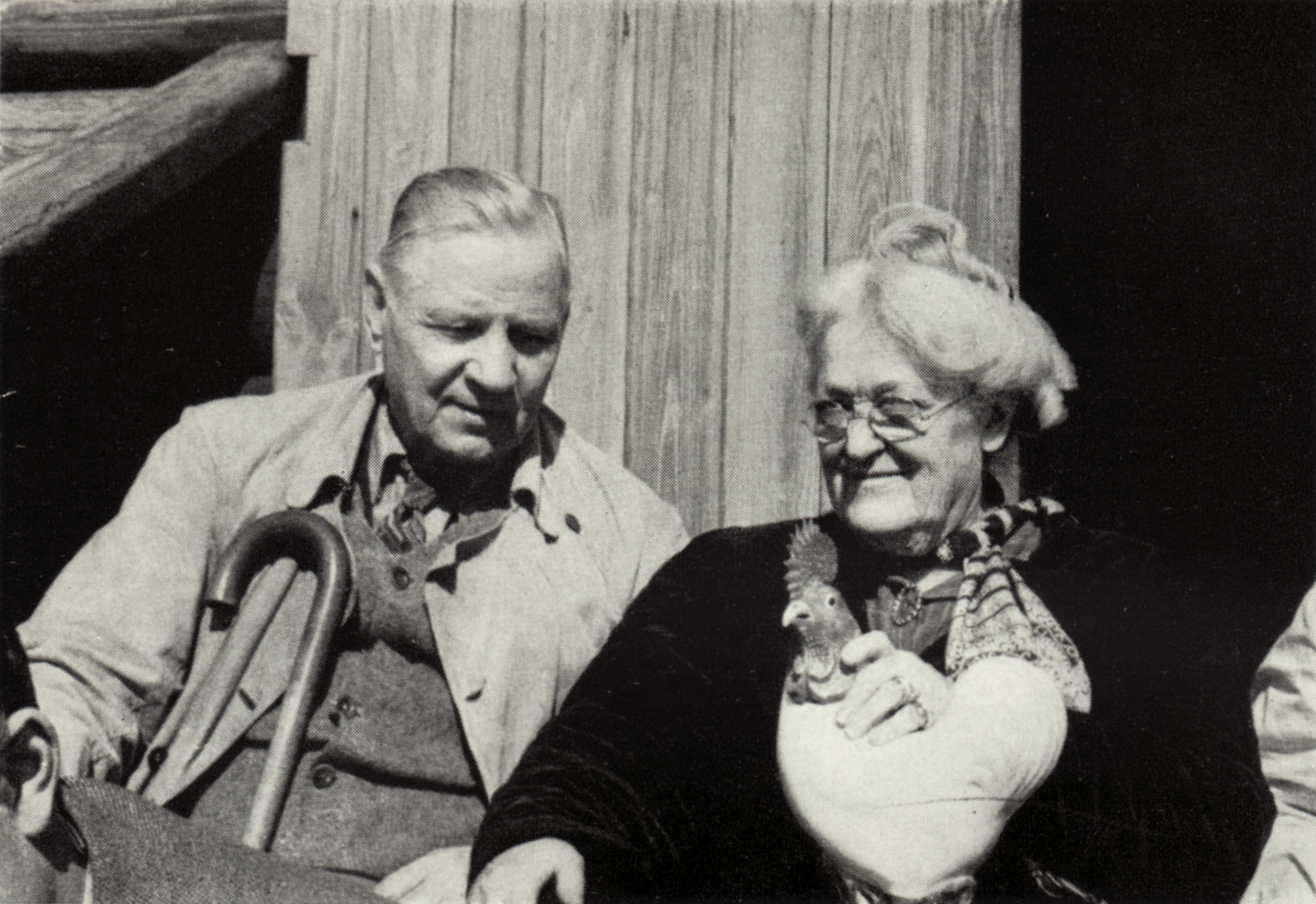 Sigfrid Edström, Ruth Randall Edström och porslinstupp.